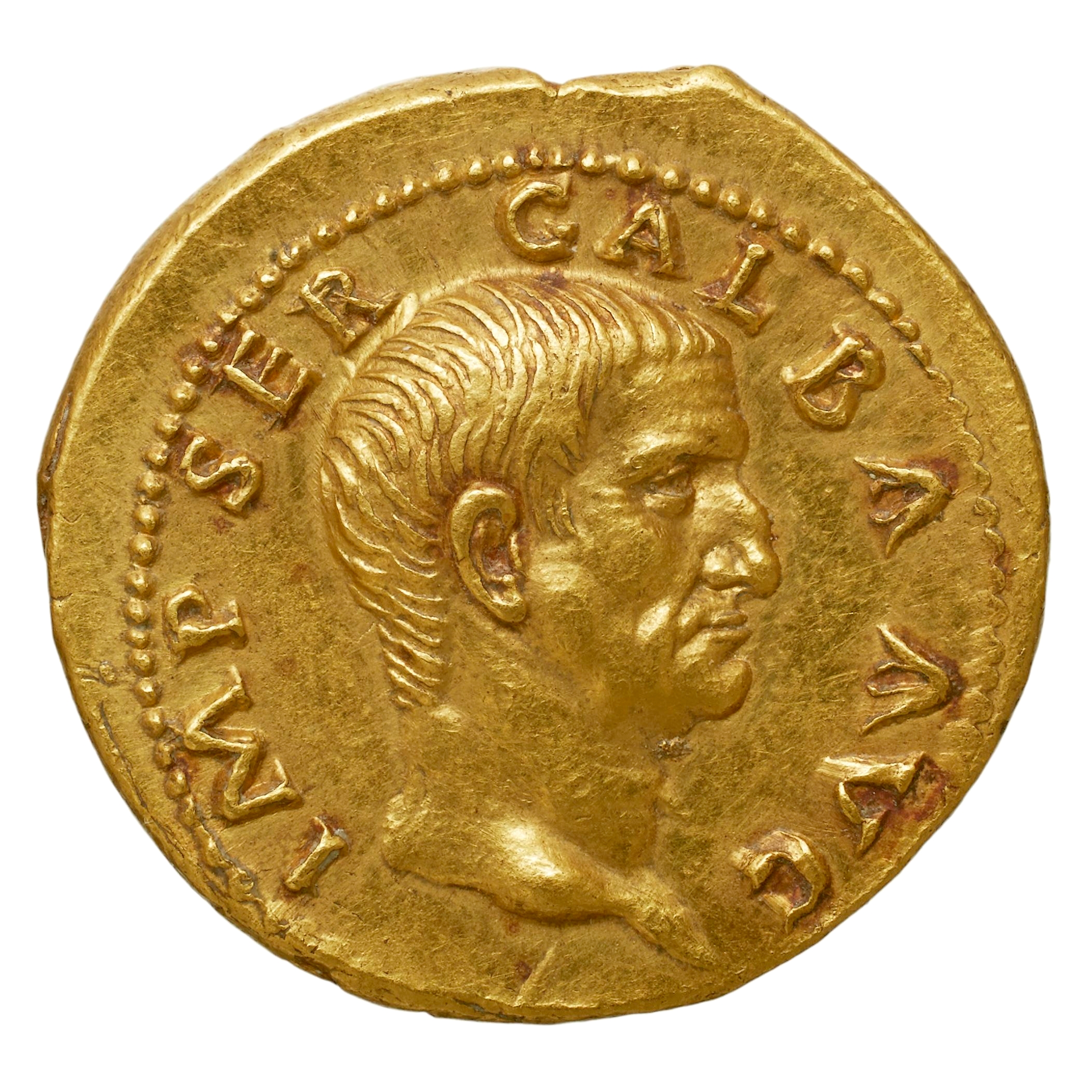 Galba, aureus. Avers : SER GALBA.IMP.CAESAR.AVG TR P. Tête de Galba à droite. Or, 7,35 gr. Rome, 68 ap.JC. Collection BnF : IMP-8855